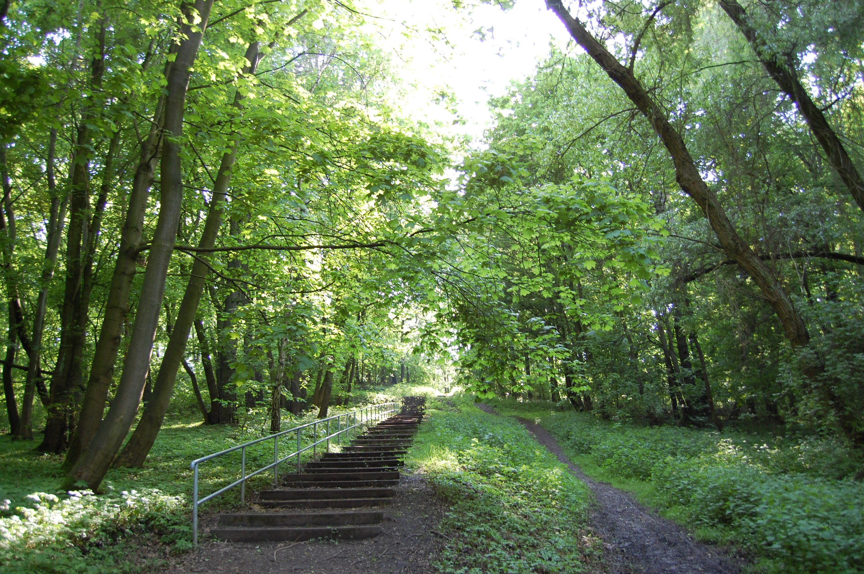 Treppe im Volkspark Westerhüsen, die Wellenberge hinauf